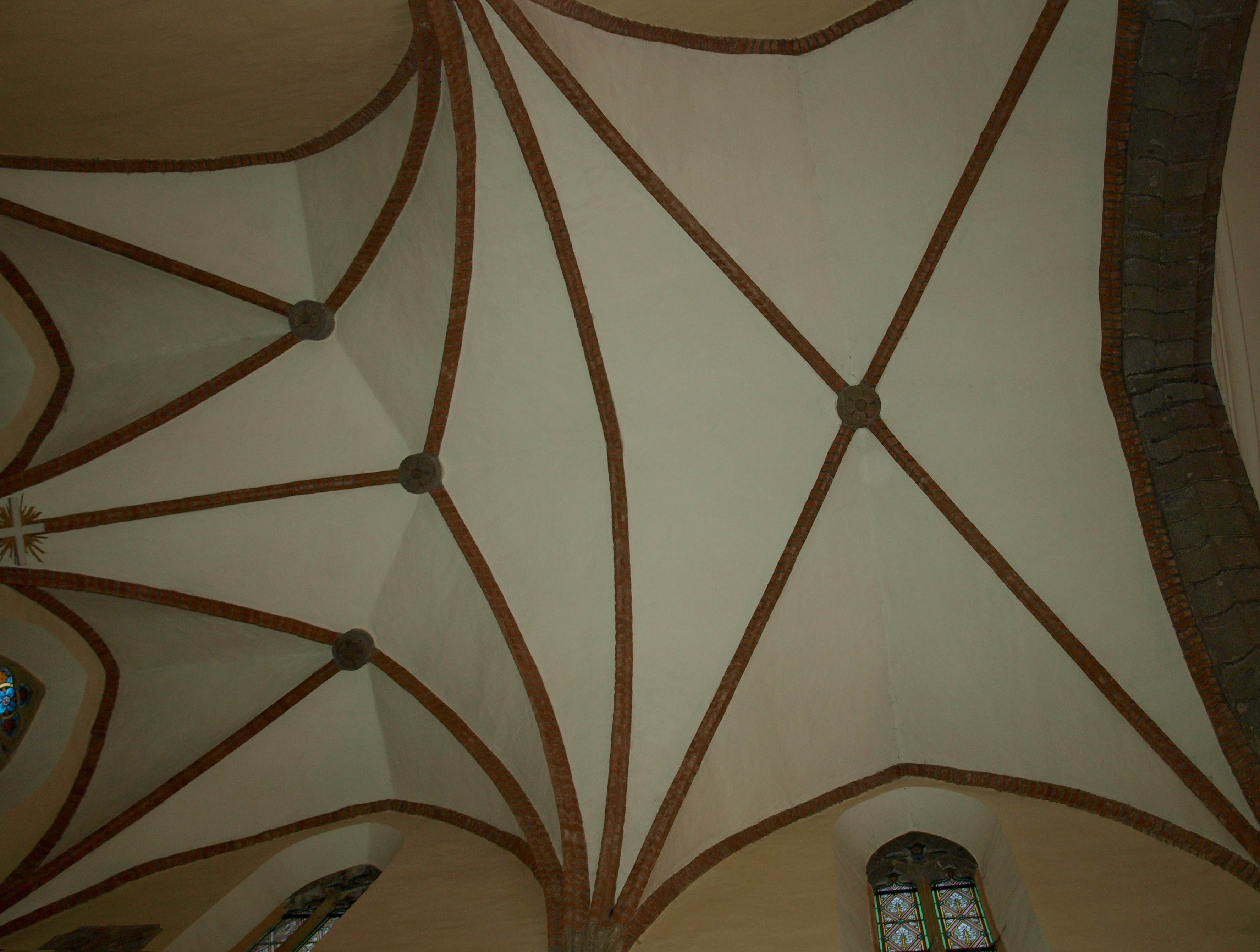 Zaklenutí presbytáře dvěma hlavními, nestejně velkými, obdélníkovými poli, kdy jedno pole je sklenuto obvyklou křížovou klenbou a jedno síťovou klenbu obkročného základu